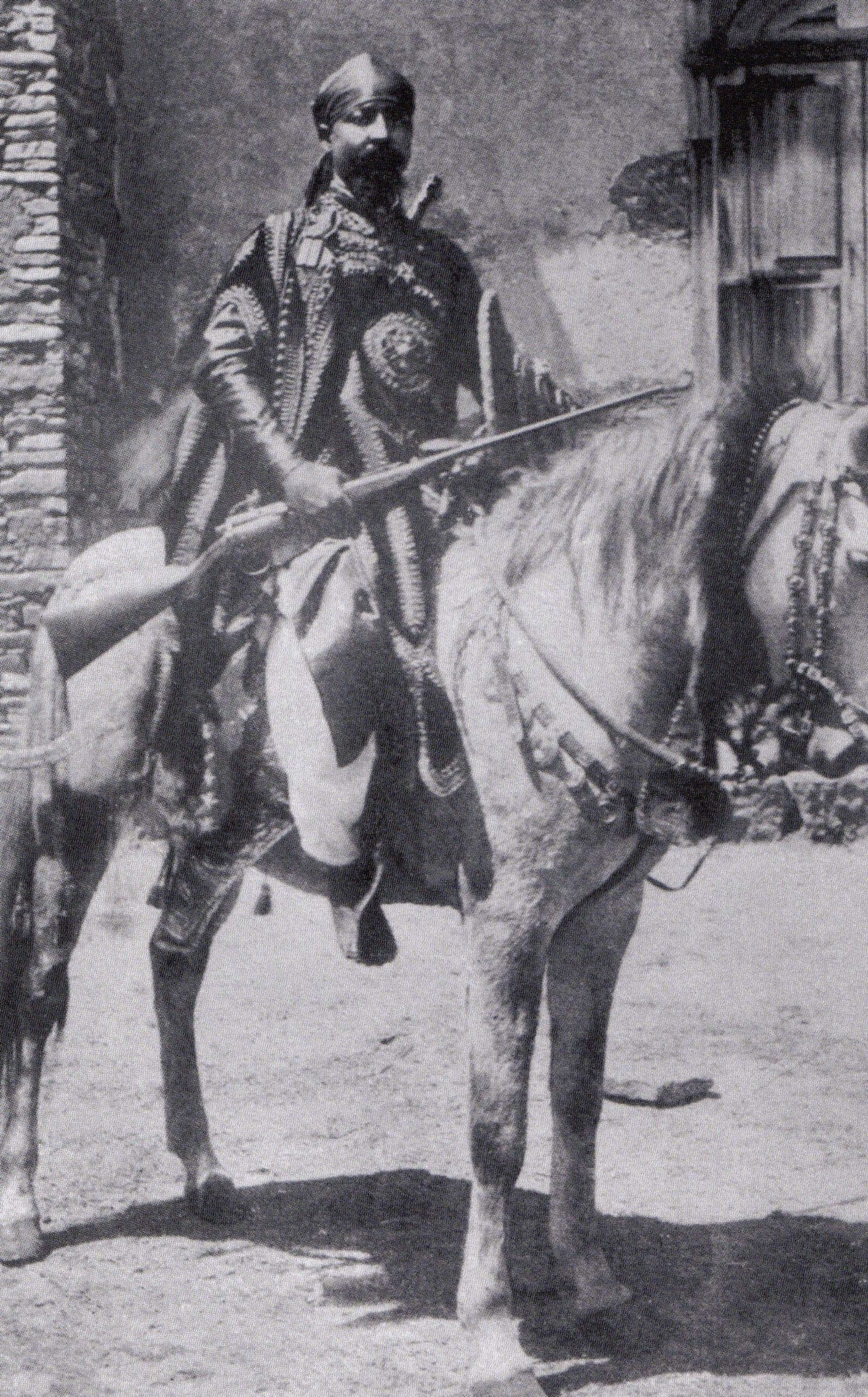 Ras Mangasha.